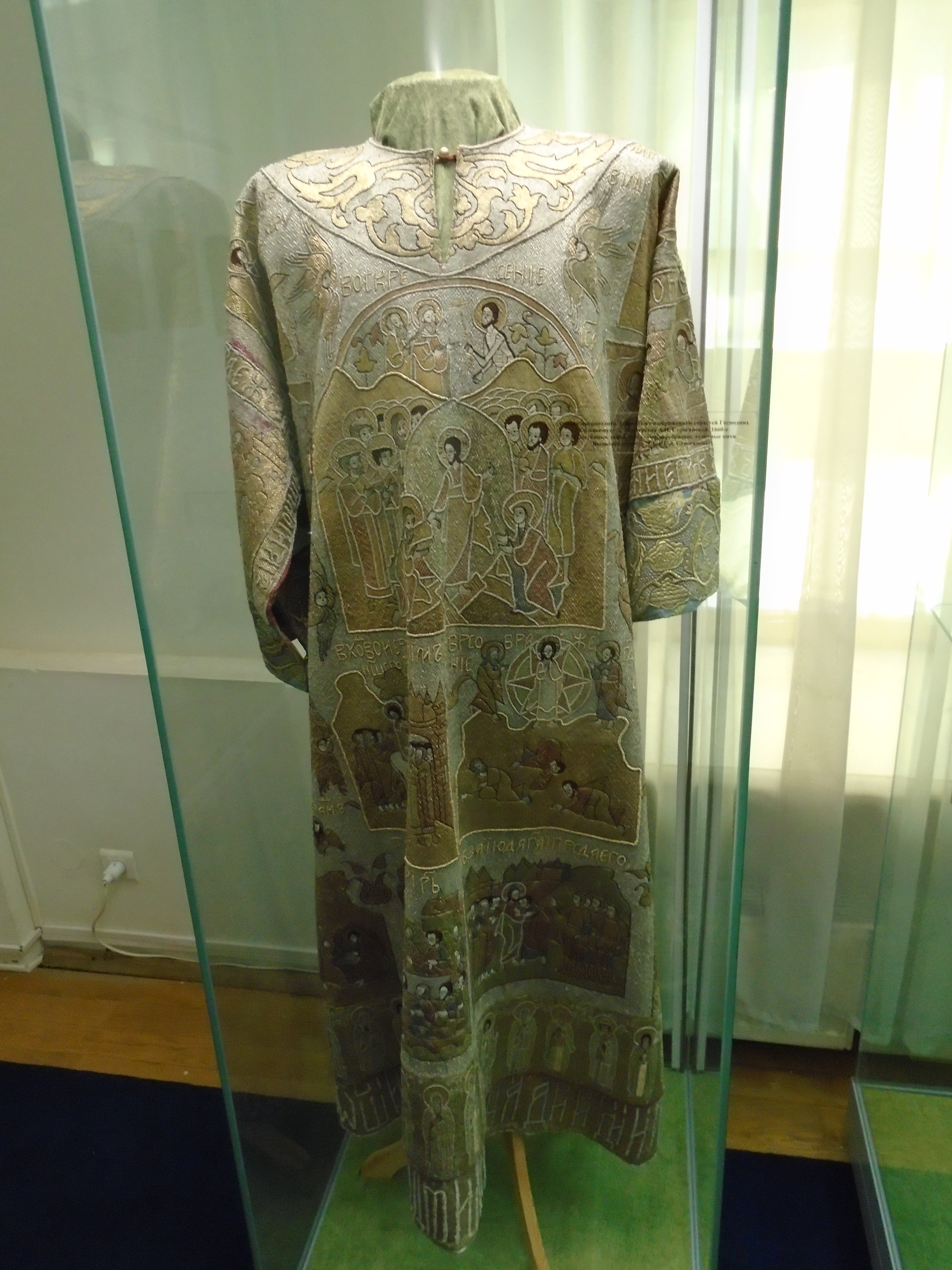 Саккос митрополита Лаврентия с изображением страстей Господних. Сольвычегодск. Мастерская А. И. Строгановой. 1660-е гг. Холст, камка, тафта, шелковые, серебряные, золотные нити. Выполнен по обету Д. А. и Г. Д. Строгановых.